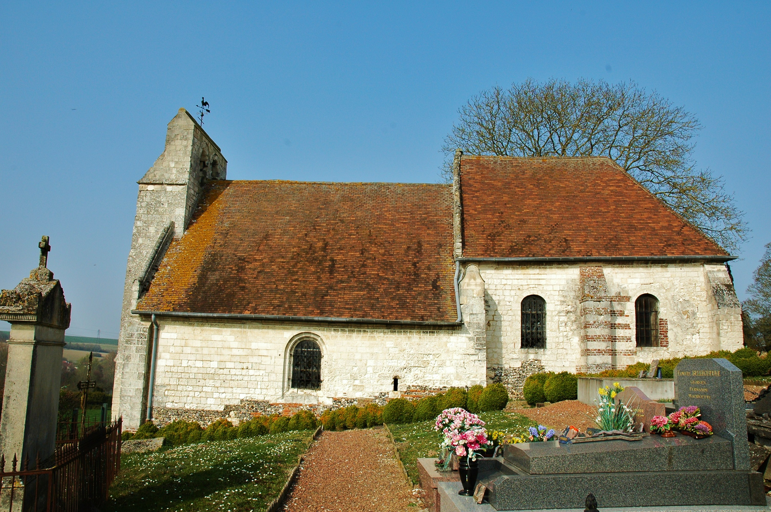 Bettencourt-Rivière (Somme, France). L'église Notre-Dame, de Rivière.